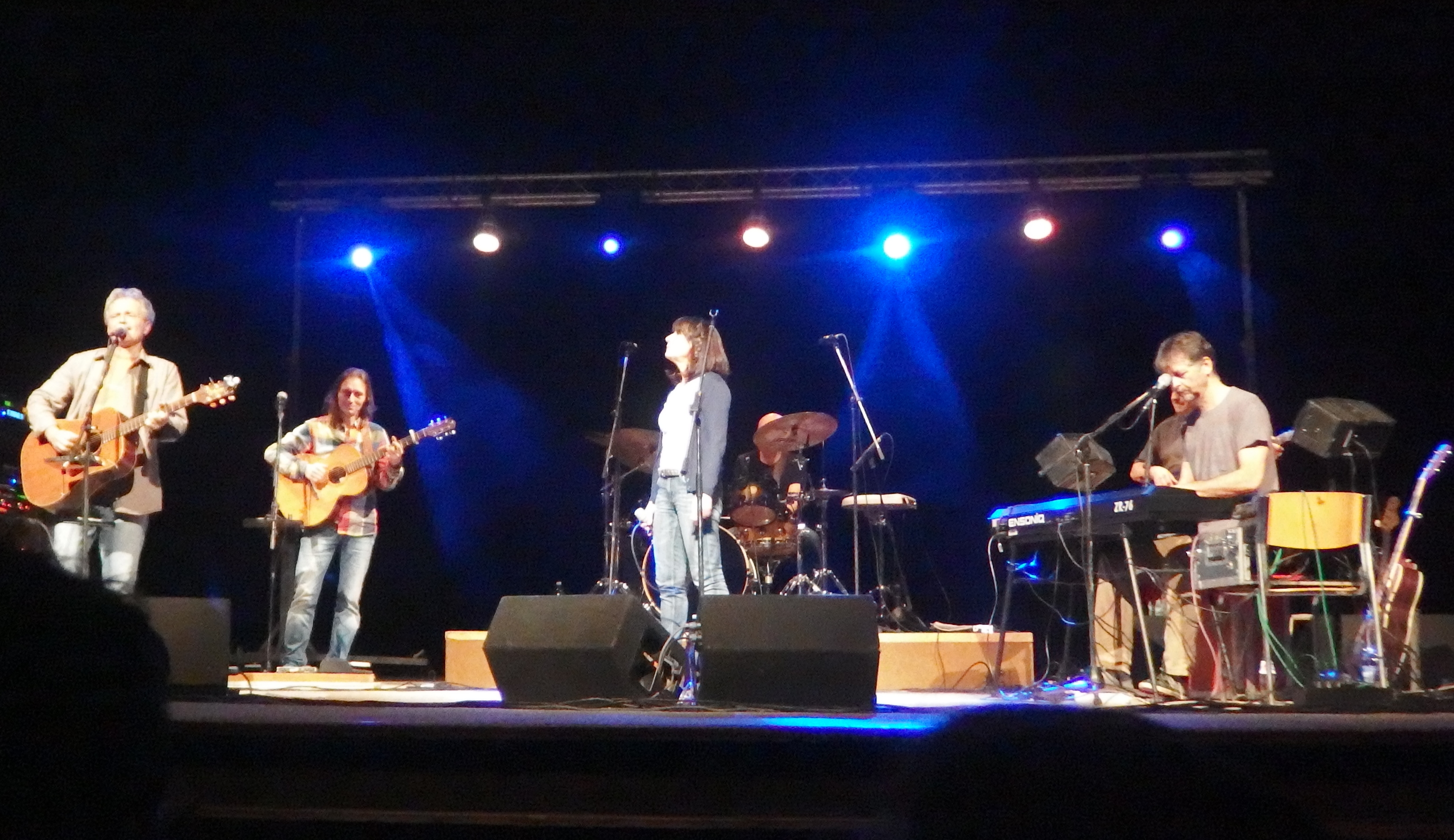 AG Flek, zlínská folkrocková hudební skupina, založená v roce 1977.